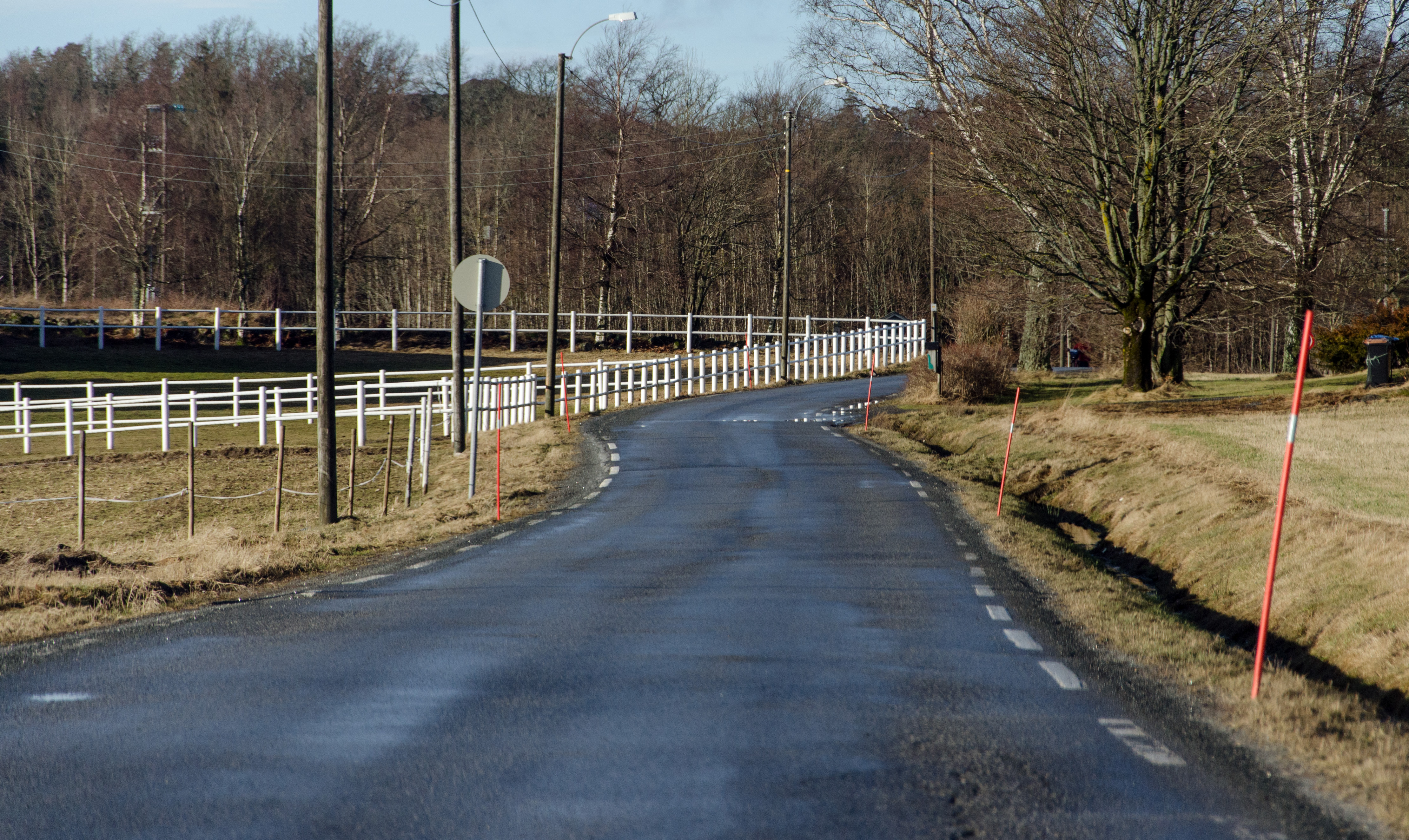 Fylkesvei 160 Klepakerveien